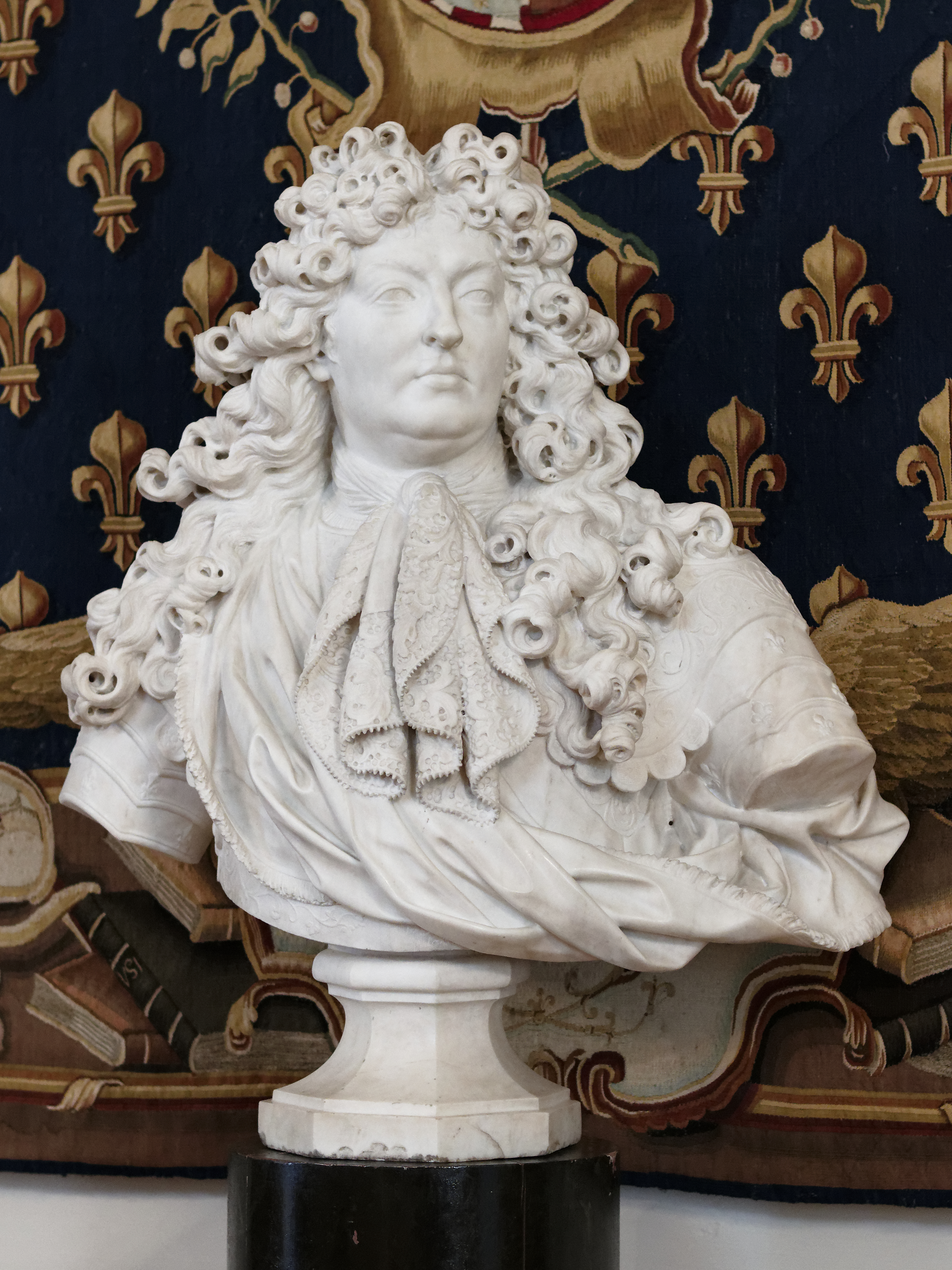 Louis XIV, marbre d'Antoine Coysevox. Acquis de l'artiste en 1686 par les Élus Généraux de Bourgogne pour orner la salle des États de leur palais dijonnais alors en construction. Au musée de Dijon en 1799. Inv CA 1023